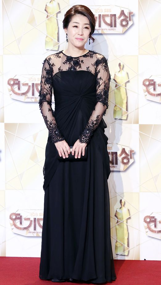 2013.12.31 SBS 演技大賞紅地氈-金美京